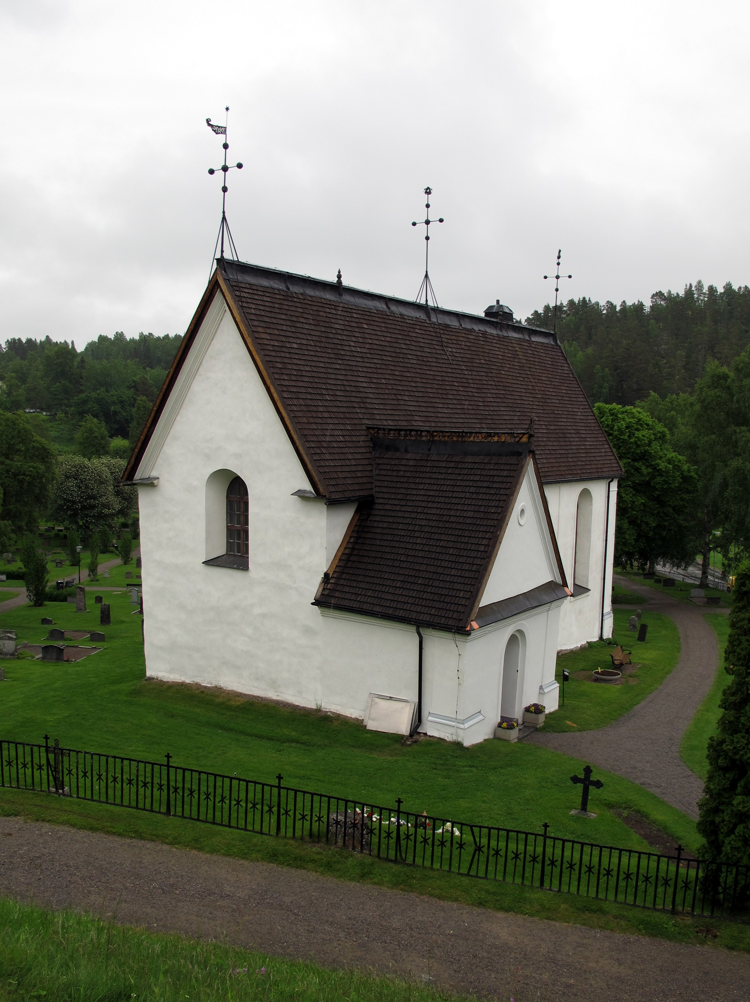 Njutångers kyrka.